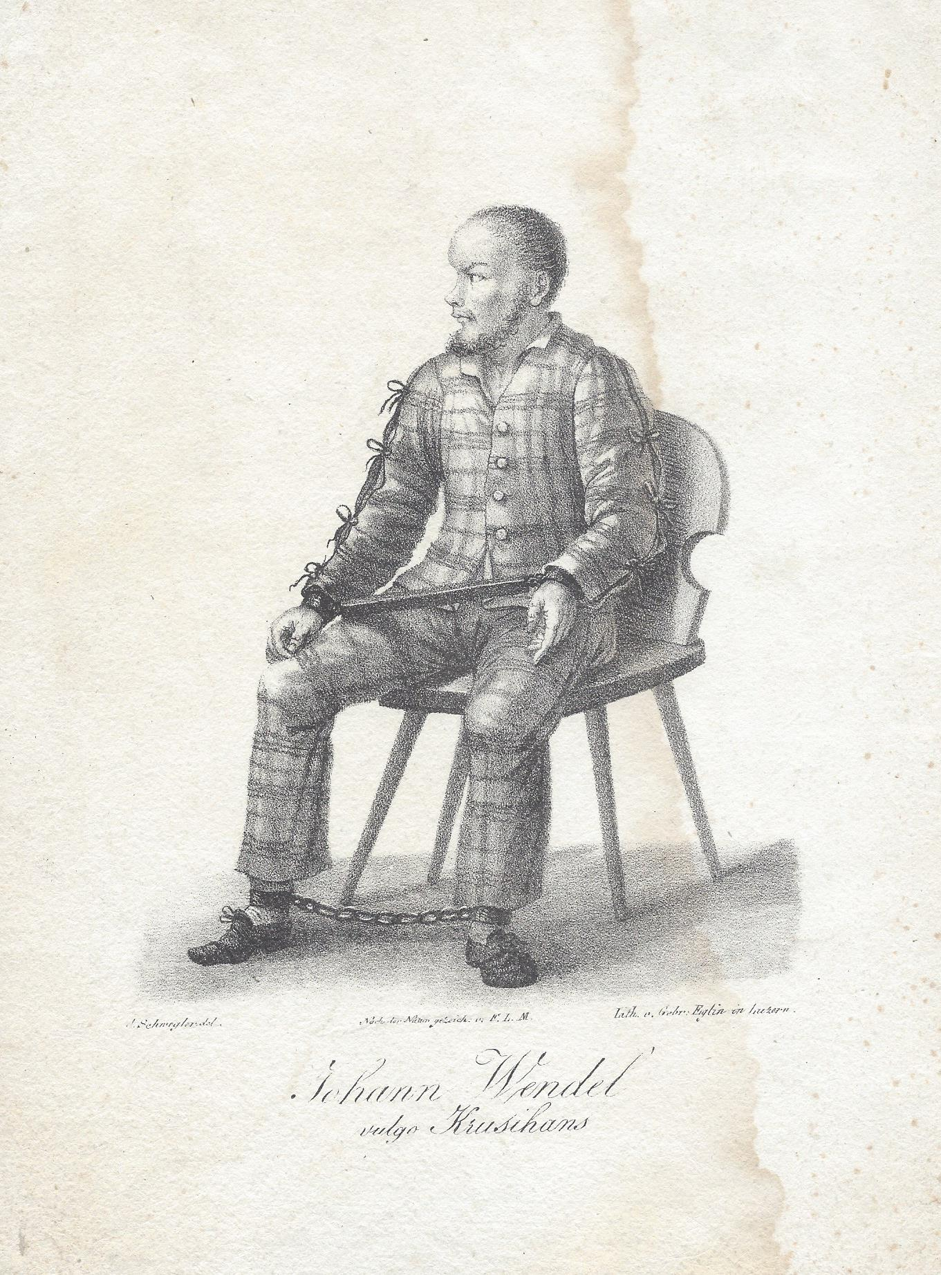 Johann Wendel alias Krusihans. Kreidelithografie von F. L. M nach einer Zeichnung von J. Schwegler bei Eiglin in Luzern.